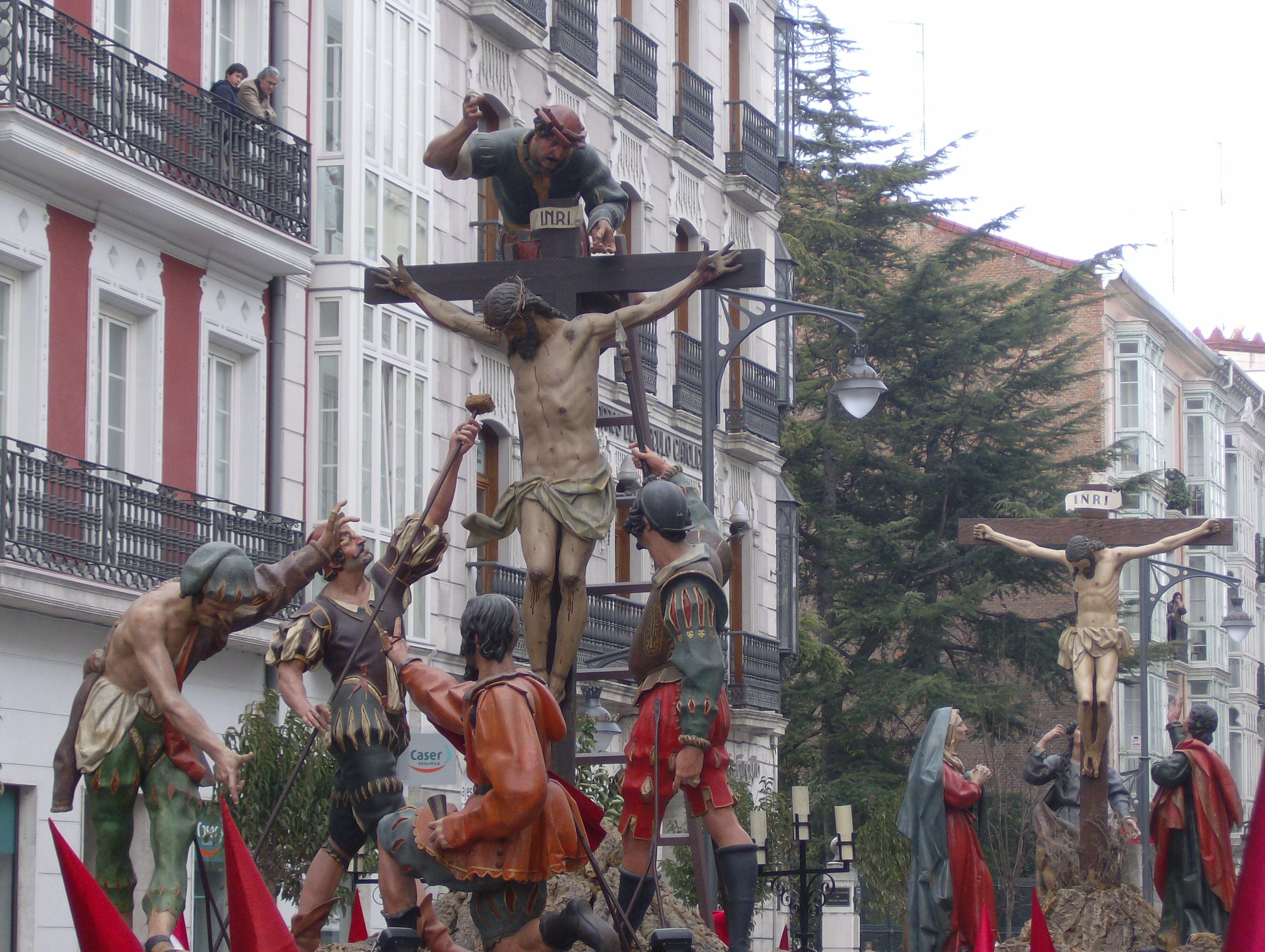 Sed Tengo (Gregorio Fernández)